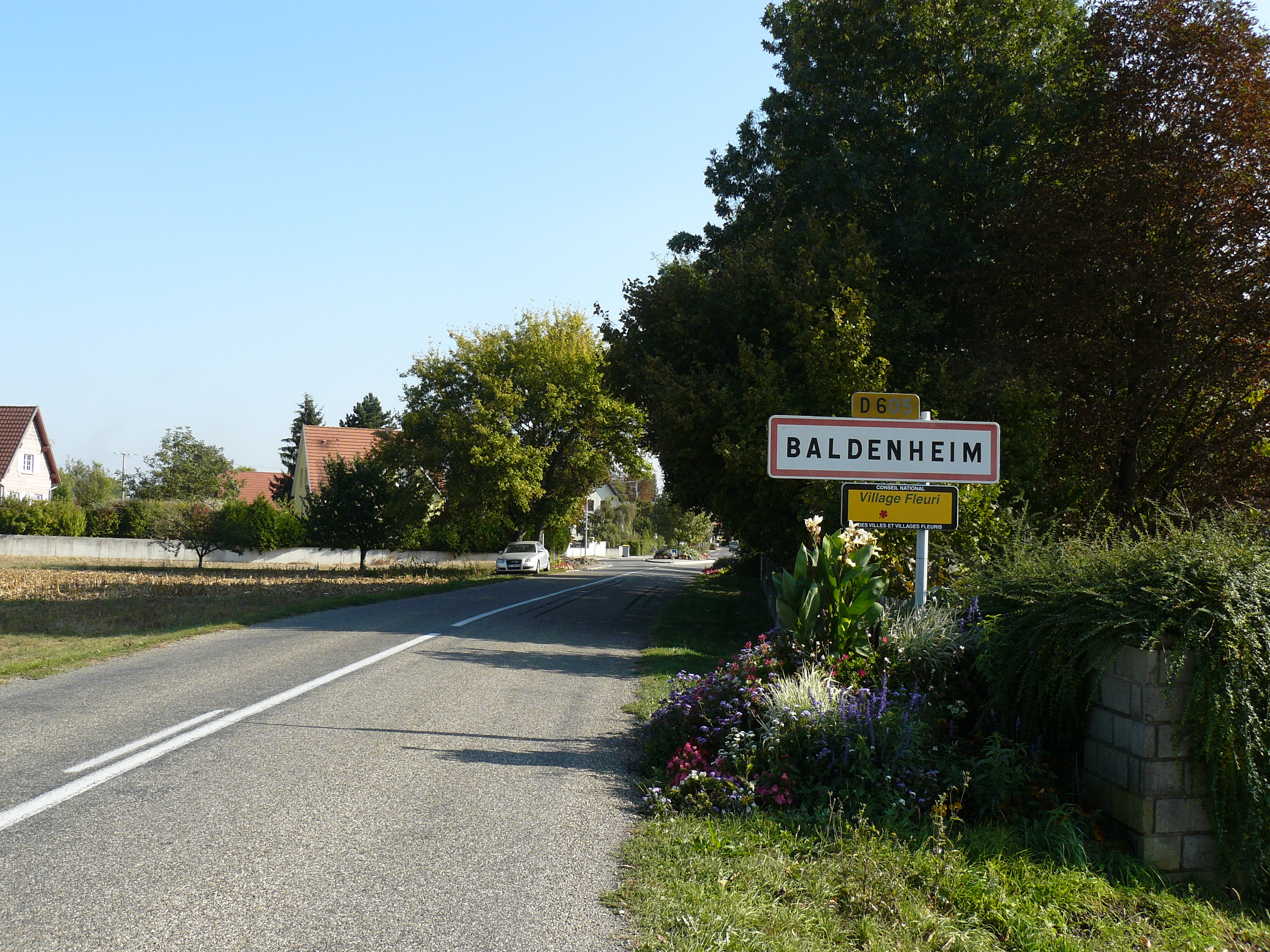 Entrée du village de Baldenheim